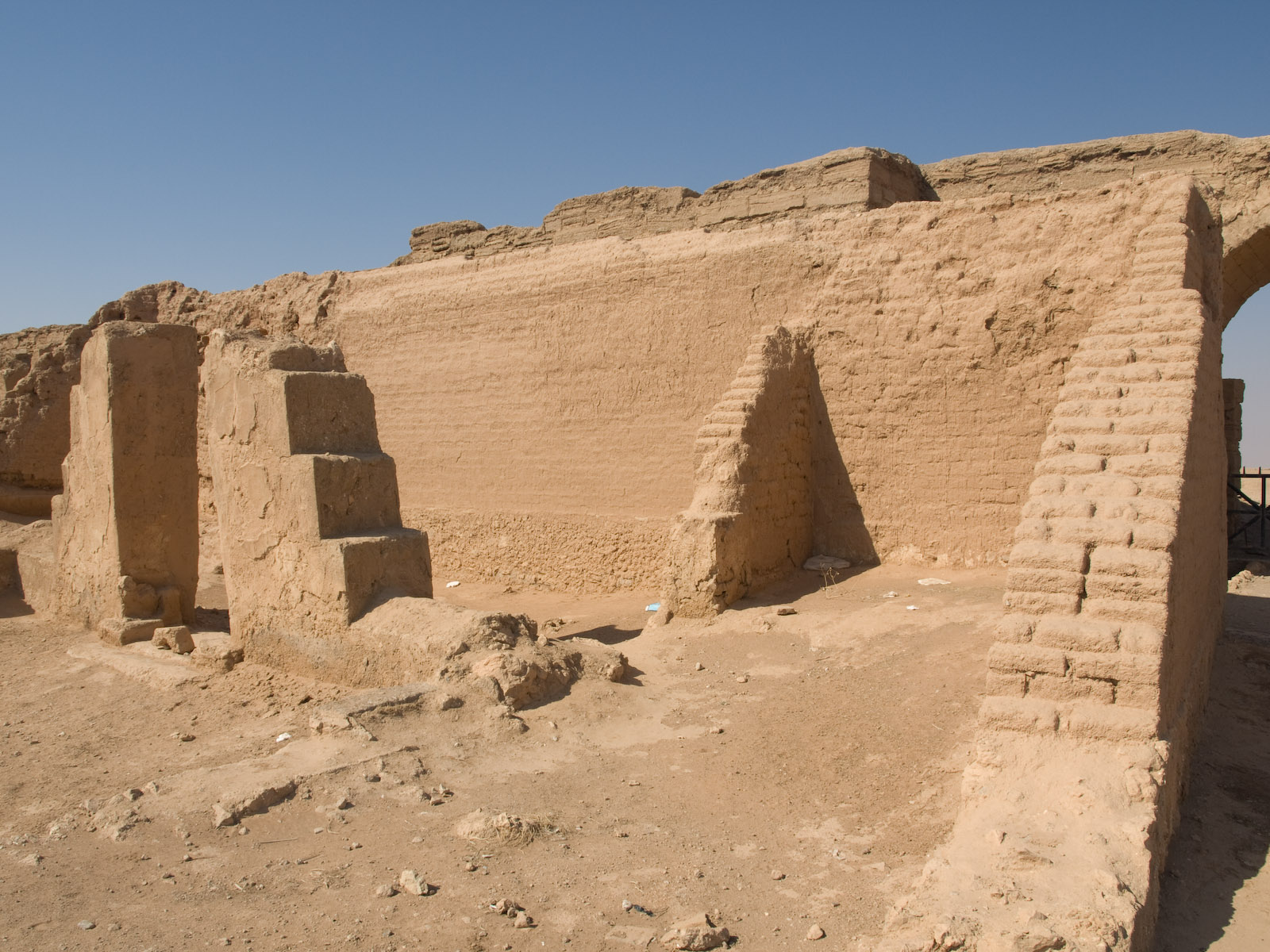 Façade de la domus ecclesiae chrétienne à Doura Europos.